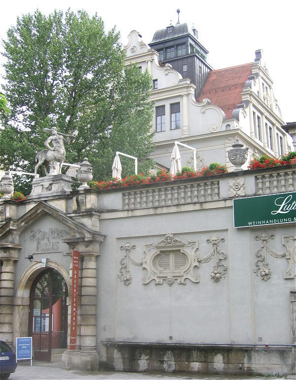 Kuenstlerhaus in Muenchen